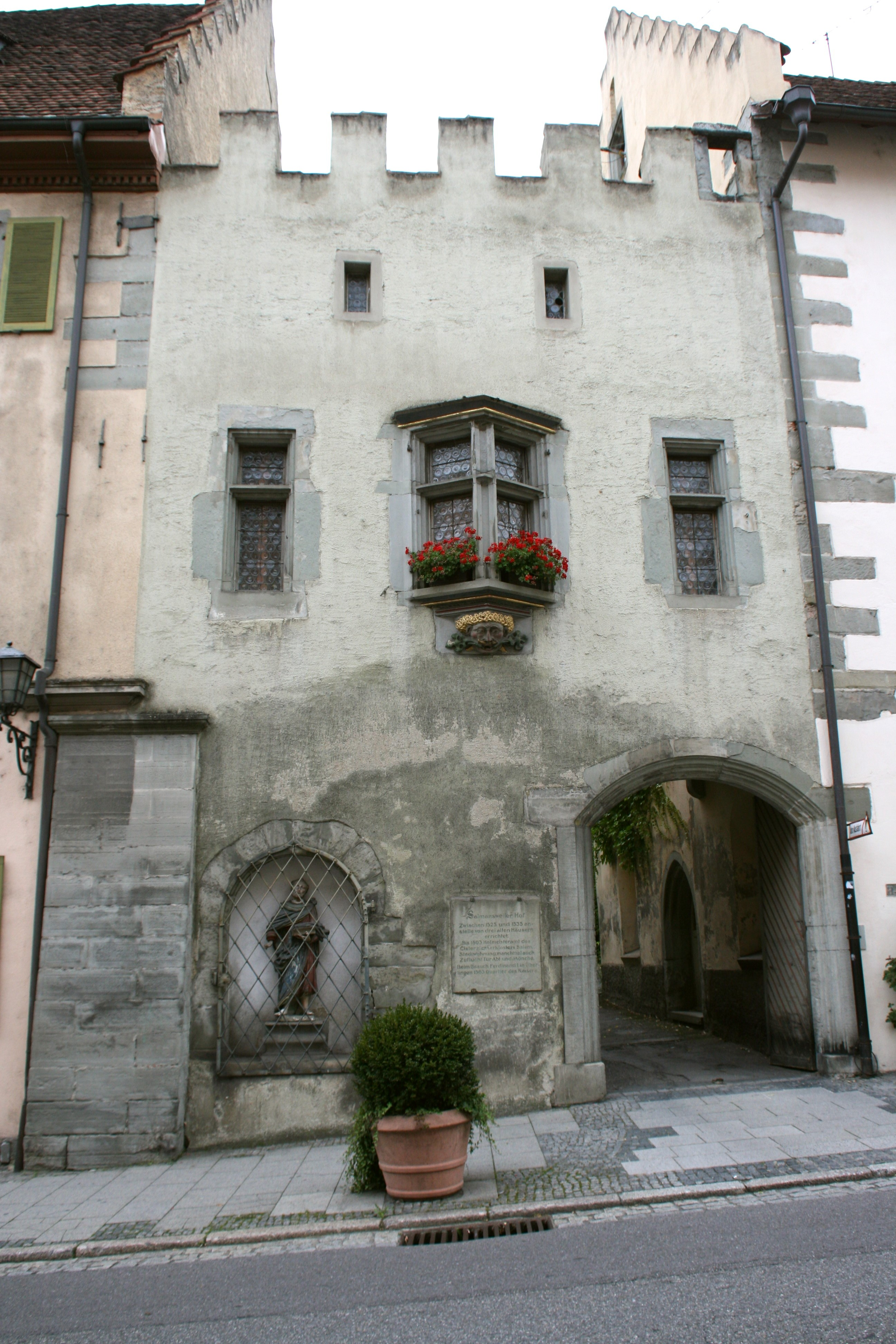 Salmansweiler Hof von 1535, Franziskanerstraße in Überlingen